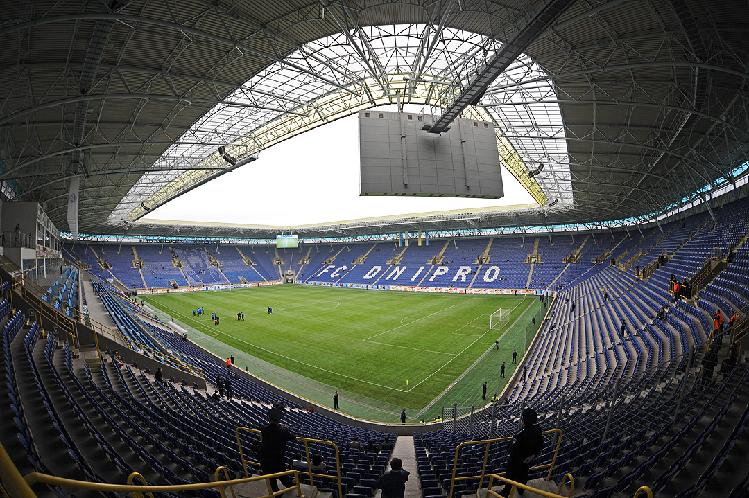 Домашняя арена Днепра